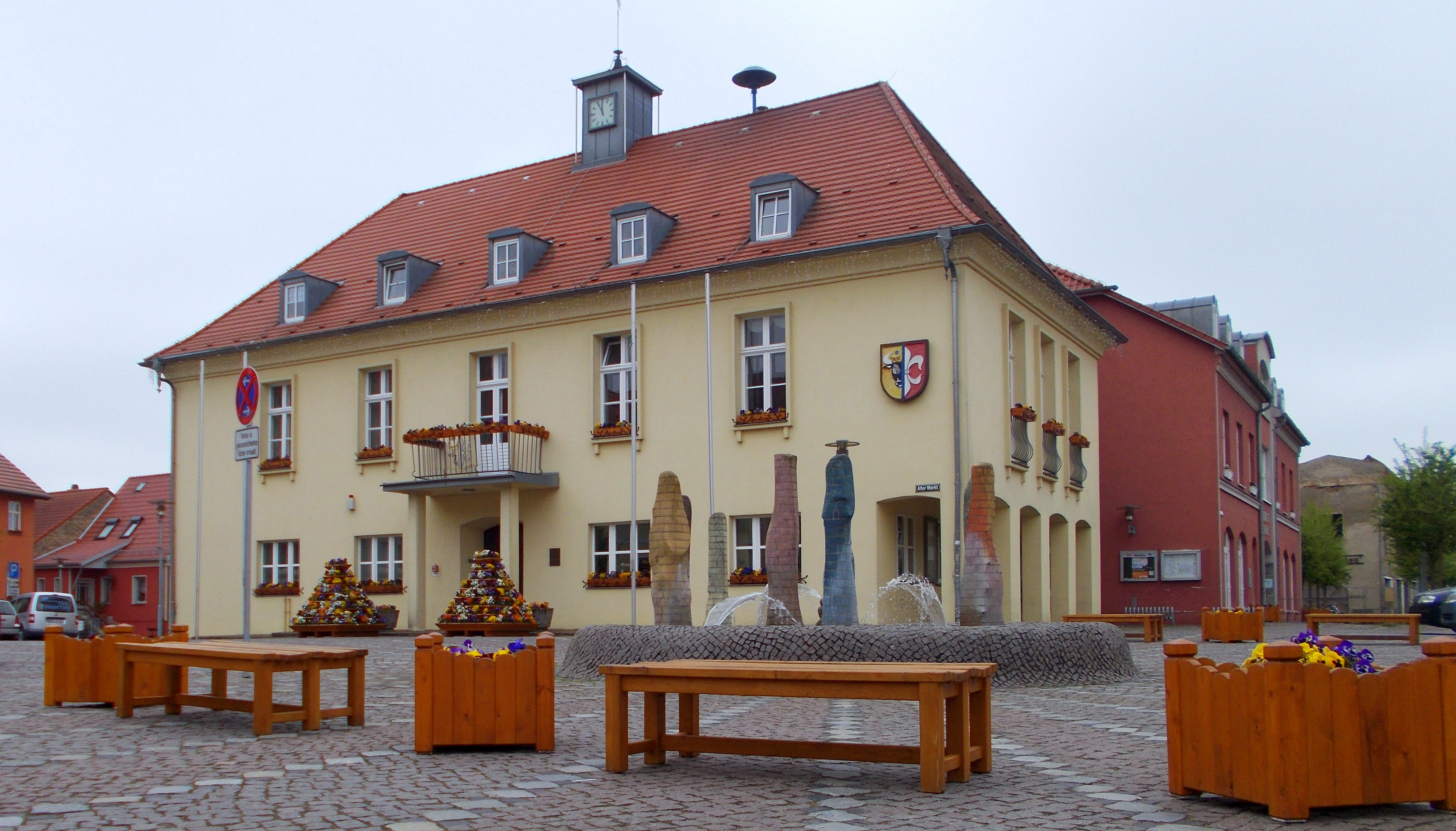 Tessin in Mecklenburg-Vorpommern Rathaus